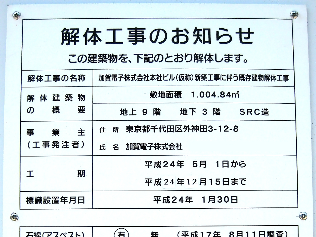 東京近鉄ビル 解体工事のお知らせ 拡大加工版 （東京都千代田区神田松永町19番の2）